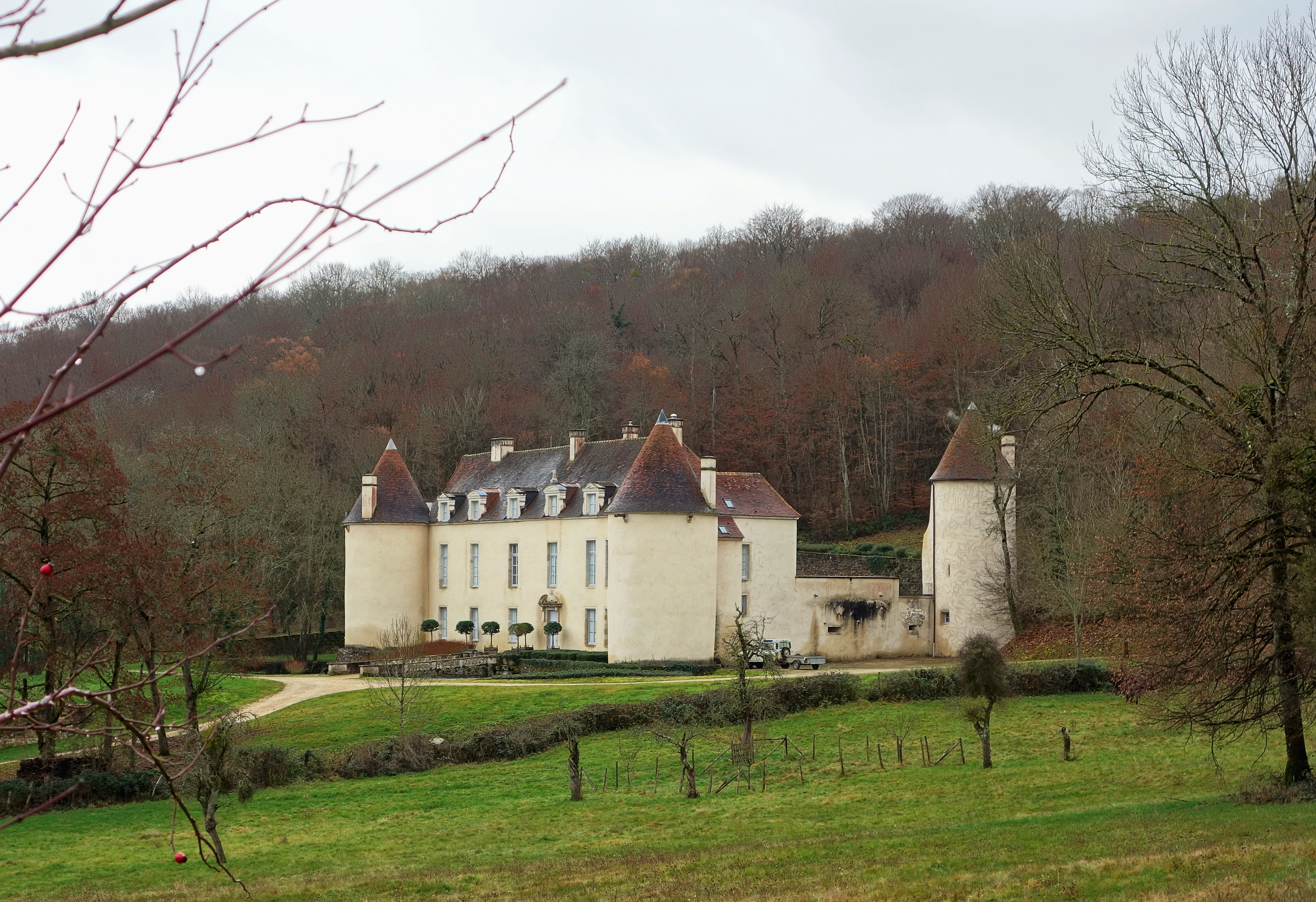 Le château de Colombier (Côte-d'Or).